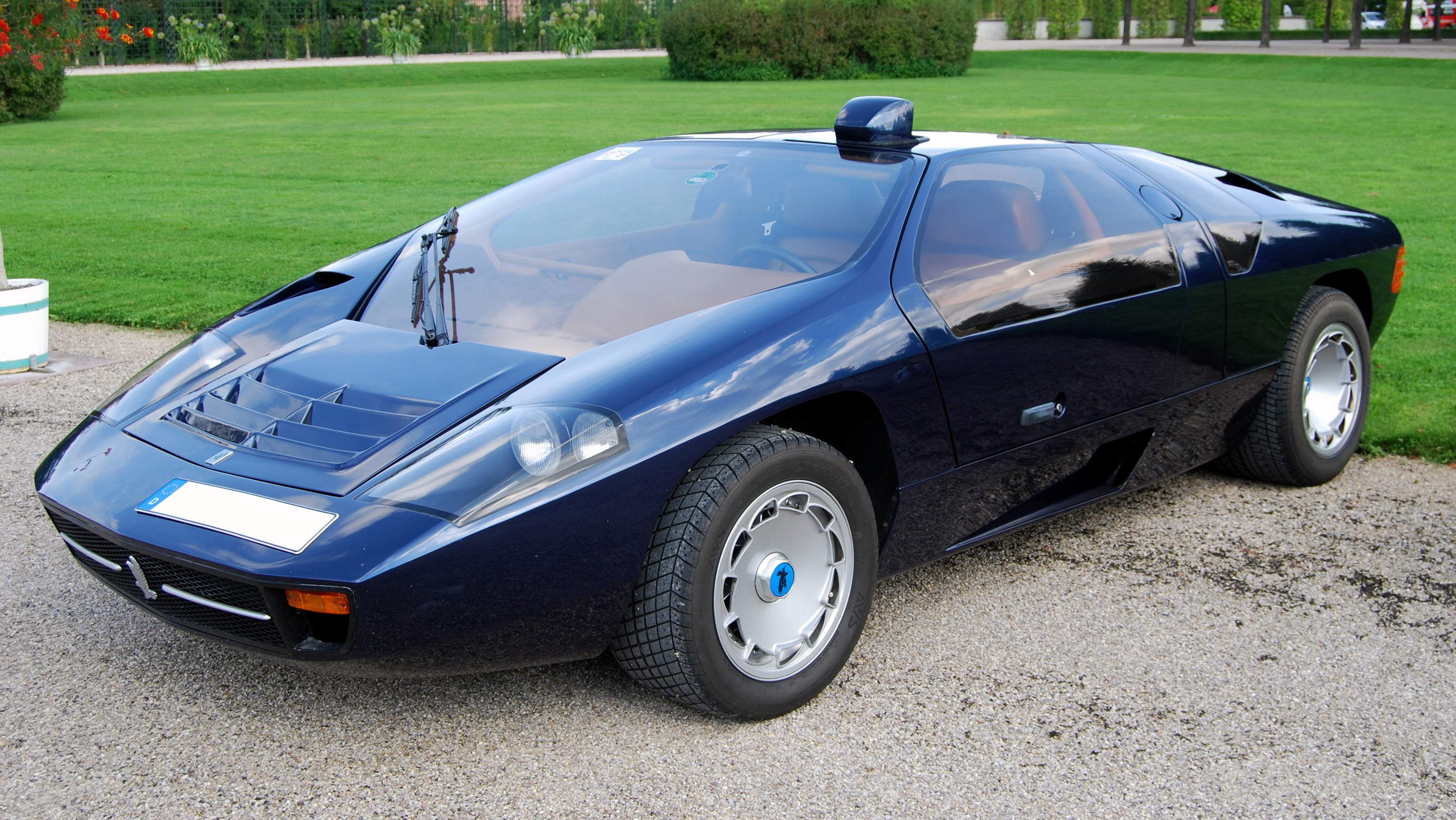 Isdera Imperator 108i Serie 1 (1984 - 1991)